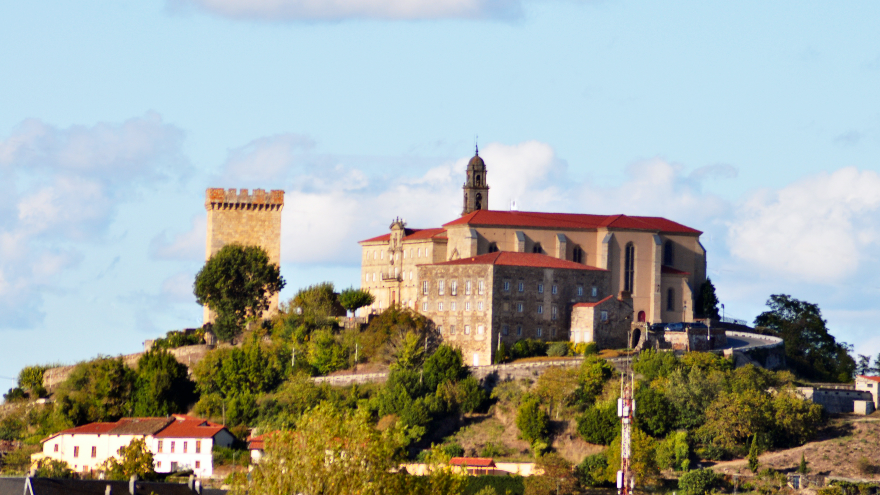 Conjunto monumental situado en Monforte de Lemos (Lugo), formado por el monasterio de San Vicente del Pino, la torre de homenaje y el palacio de los Condes de Lemos. También, se conserva parte de la muralla y dos torres defensivas. El monasterio, junto con el palacio, constituyen el Parador Nacional de Turismo de Monforte de Lemos.